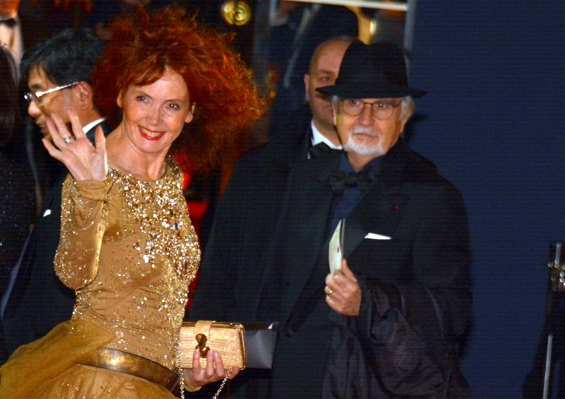 Sabine Azéma à la cérémonie des César